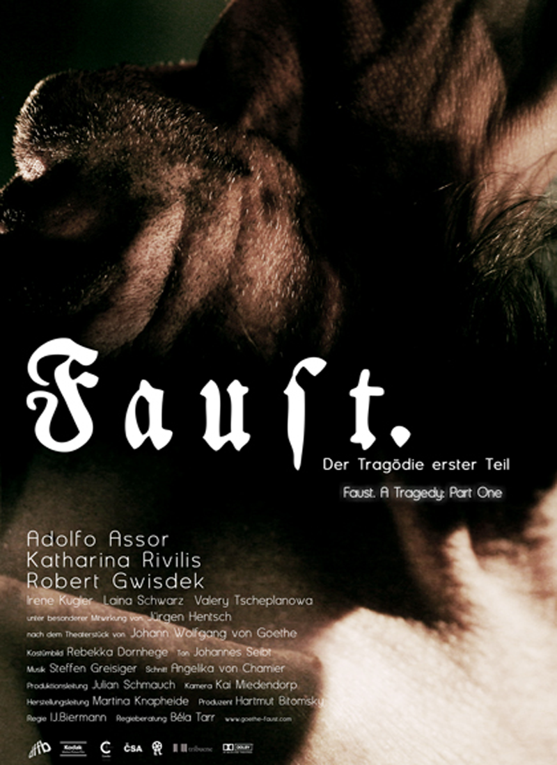 Filmplakat der Faustverfilmung von 2009